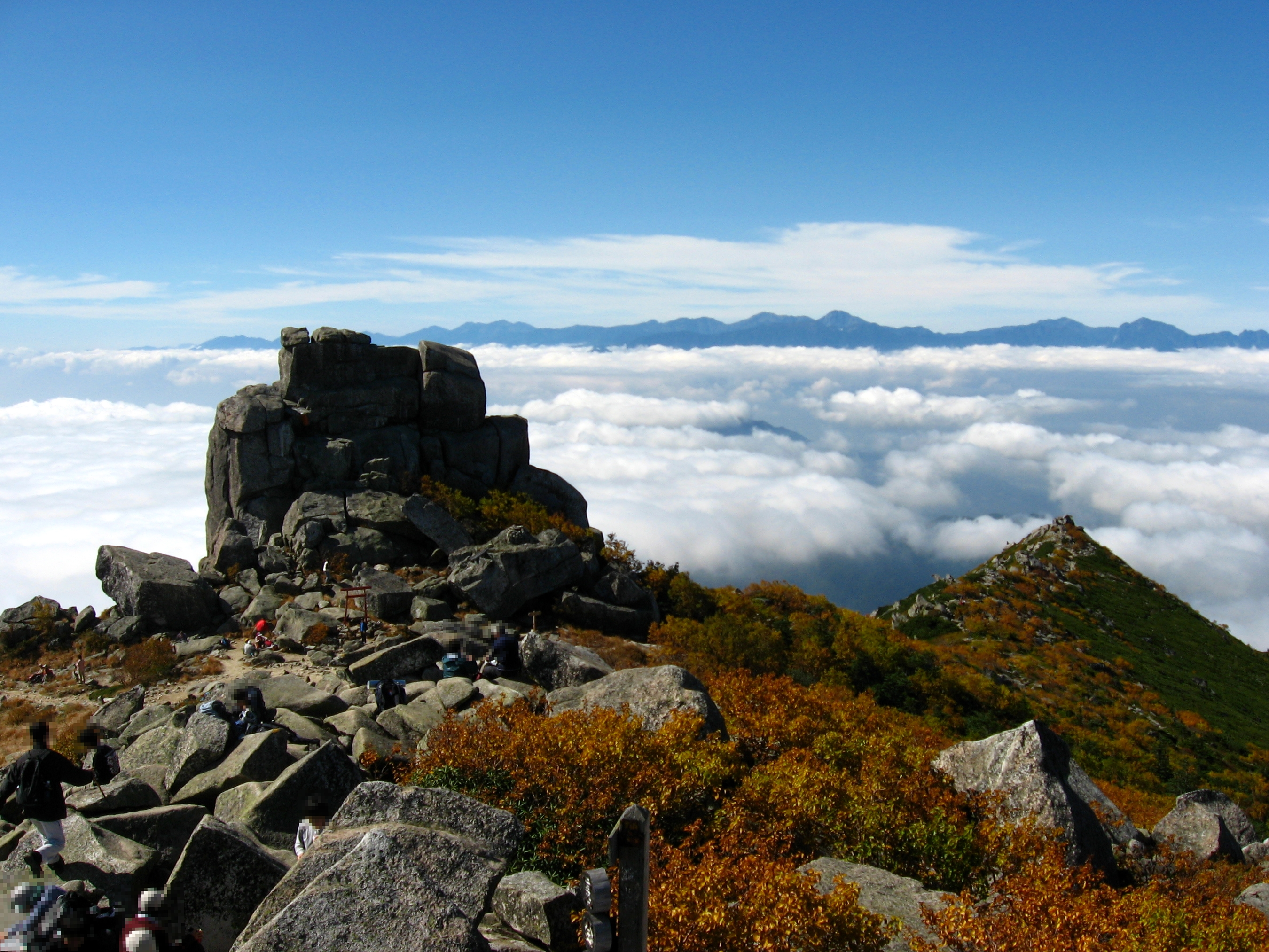 奥秩父 金峰山 五丈岩